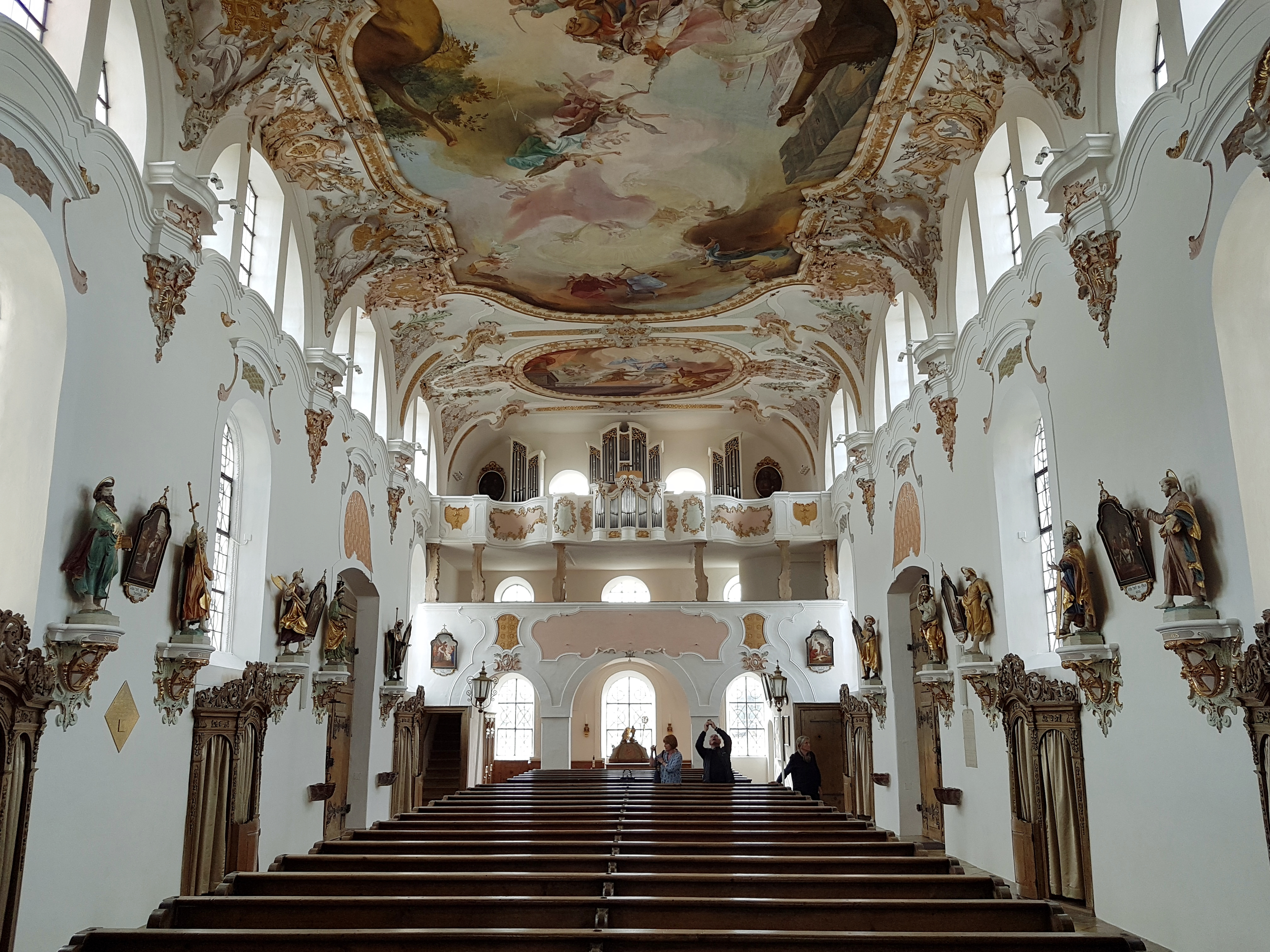 St. Ulrich (Eresing), Innenraum mit Blick zur Empore